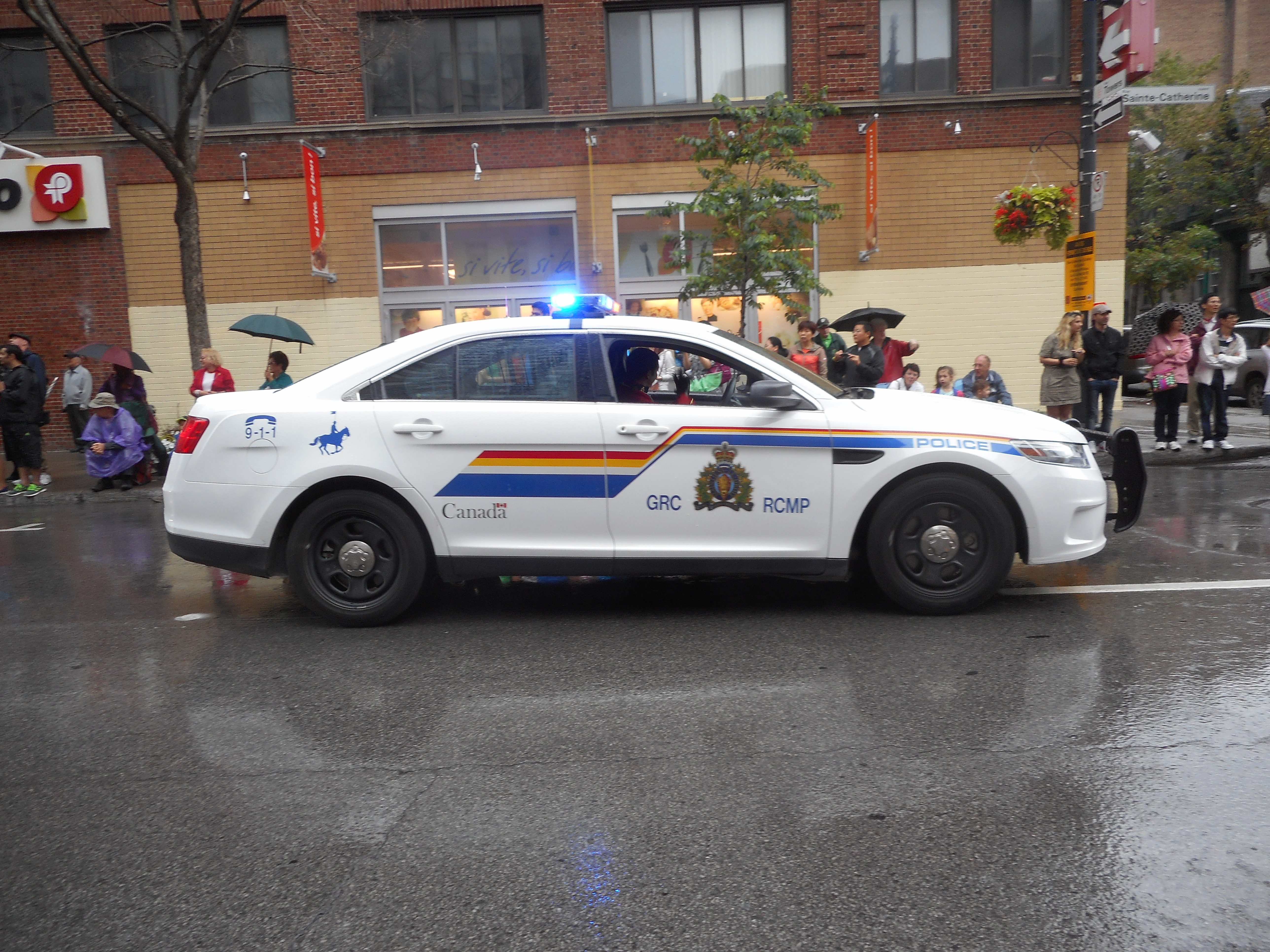 Défilé de la Fête du Canada, rue Sainte-Catherine Ouest, Montréal